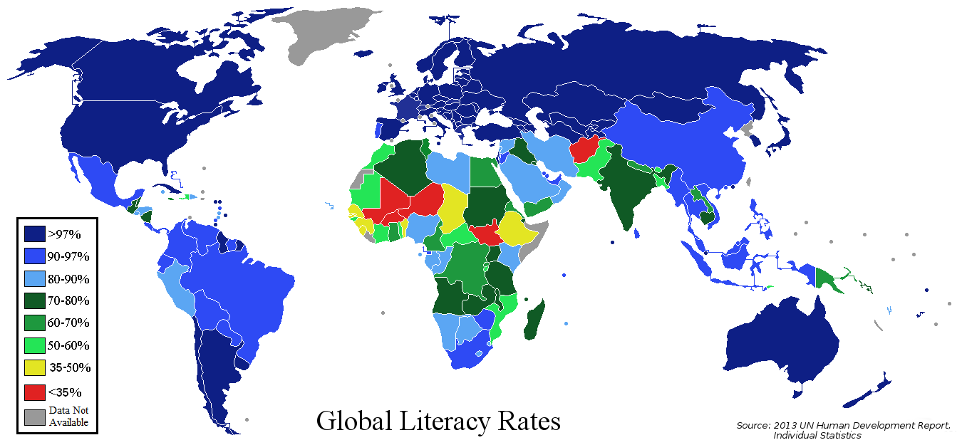 Mapa mundial Analfabetismo 2013